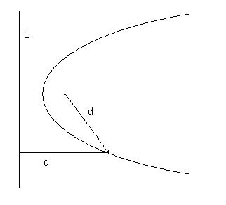 zelf gemaakt